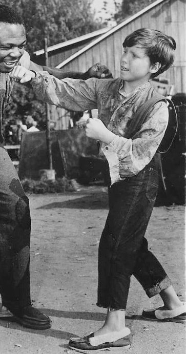 Boxer Archie Moore & Eddie Hodges star in Huckleberry Finn 1960 Press Photo